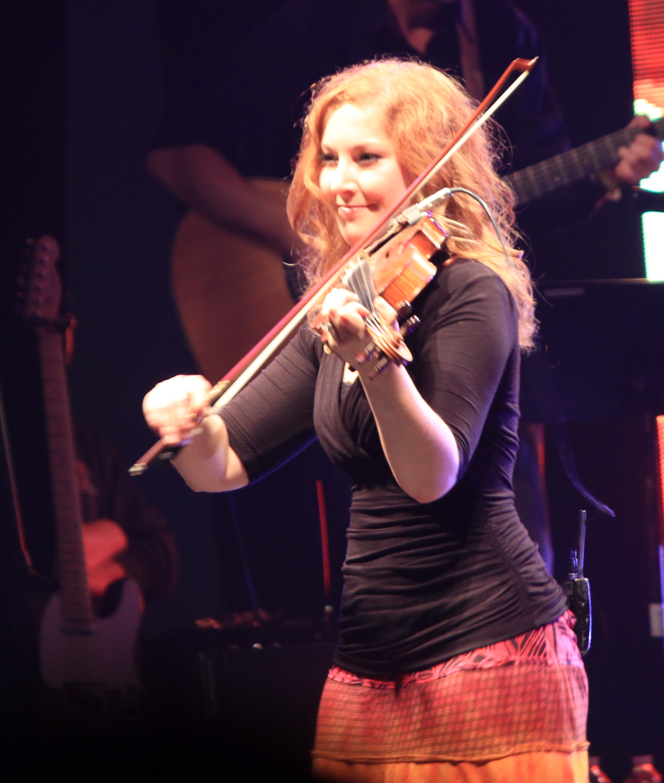 Louise Vautour lors de la soirée acadienne organisée dans le cadre du festival interceltique de Lorient 2012.